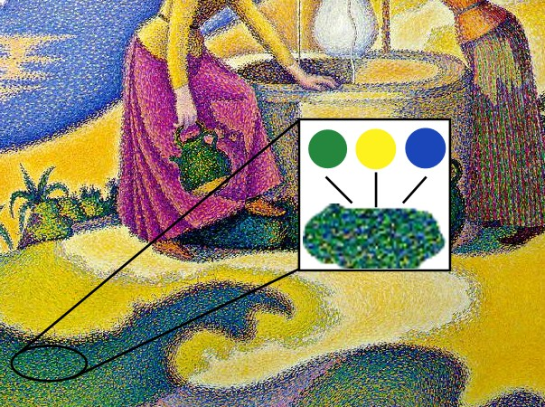 D'après Paul Signac Femmes au puits 1892.jpg, fichier retravaillé pour distinguer les détails